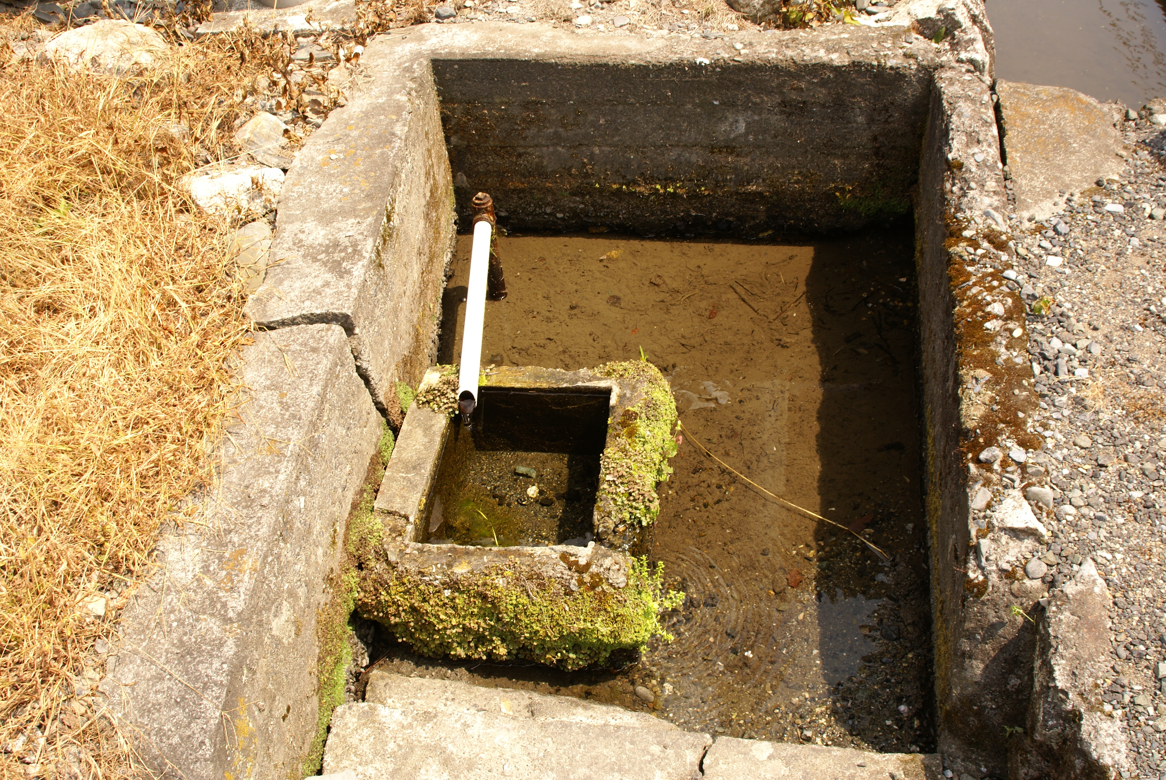 Kabata at Harie village, Takashima, Shiga, Japan